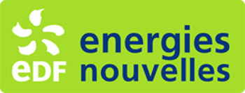 Ancien logo